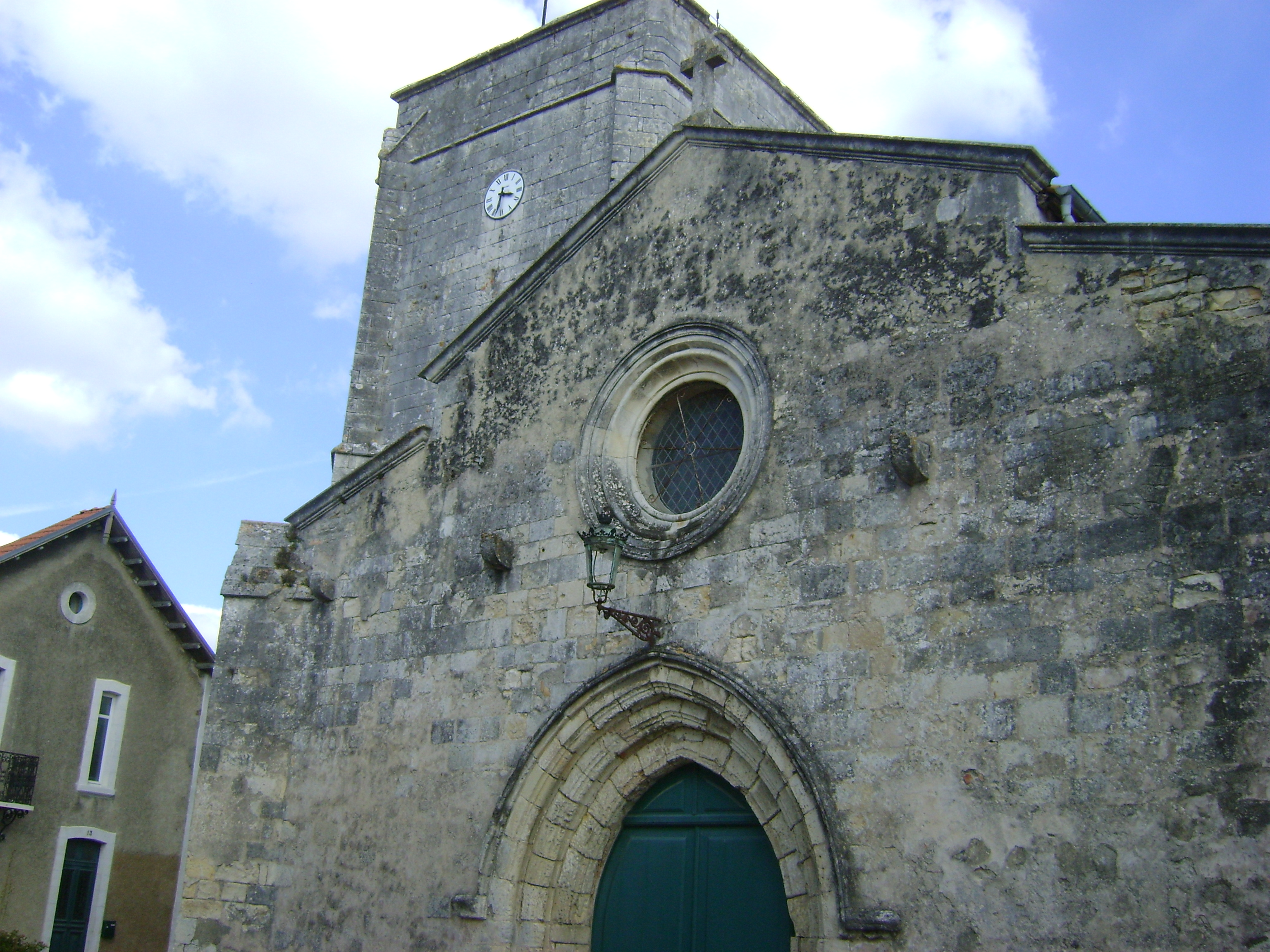 Eglise de Nieul-sur-Mer, Charente-Maritime. Le portail d'entrée. .